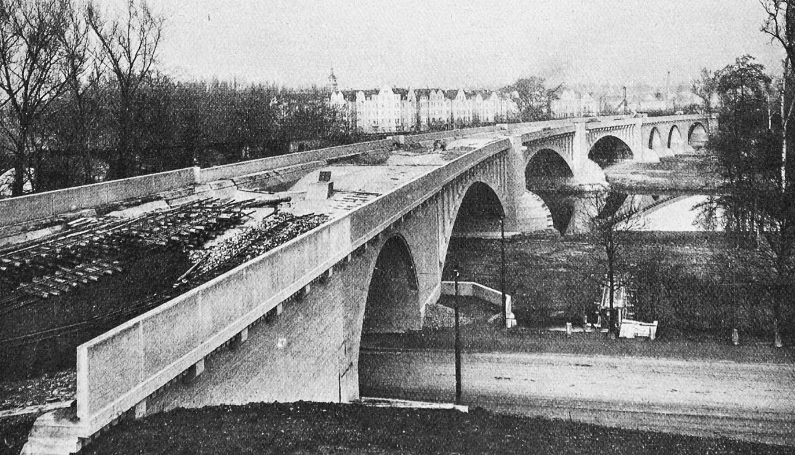 Stuttgart. Die weitgehend fertige neue Rosenteinbrücke noch während der Bauarbeiten, gesehen von oberhalb der Stuttgarter Straße.